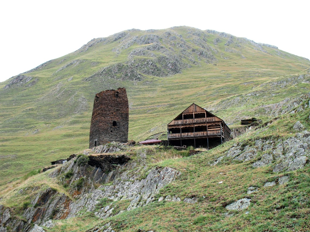 Farsma